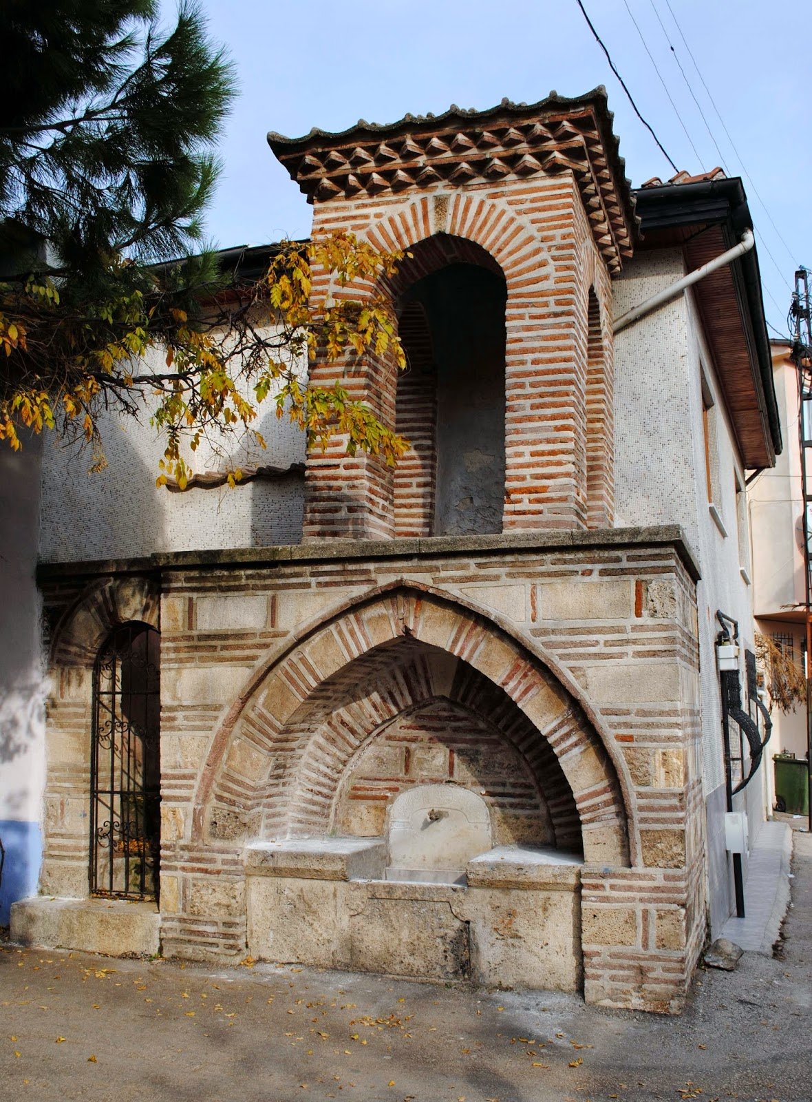 veledi yaniç minare